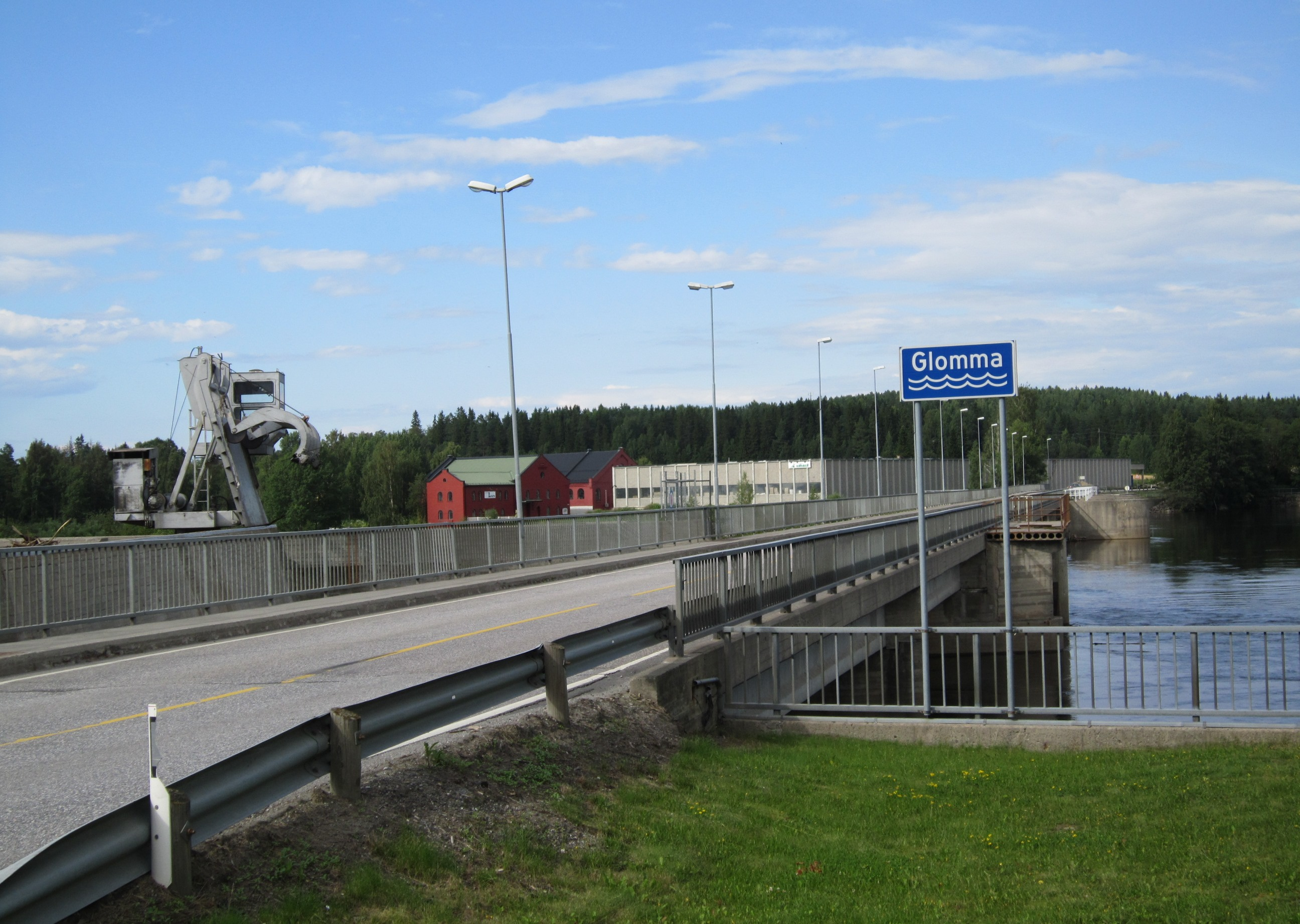 Funnefoss bru over Glomma med fylkesvei 482